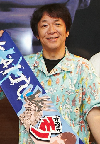 Argazkia / Fotografía: Floro Azqueta